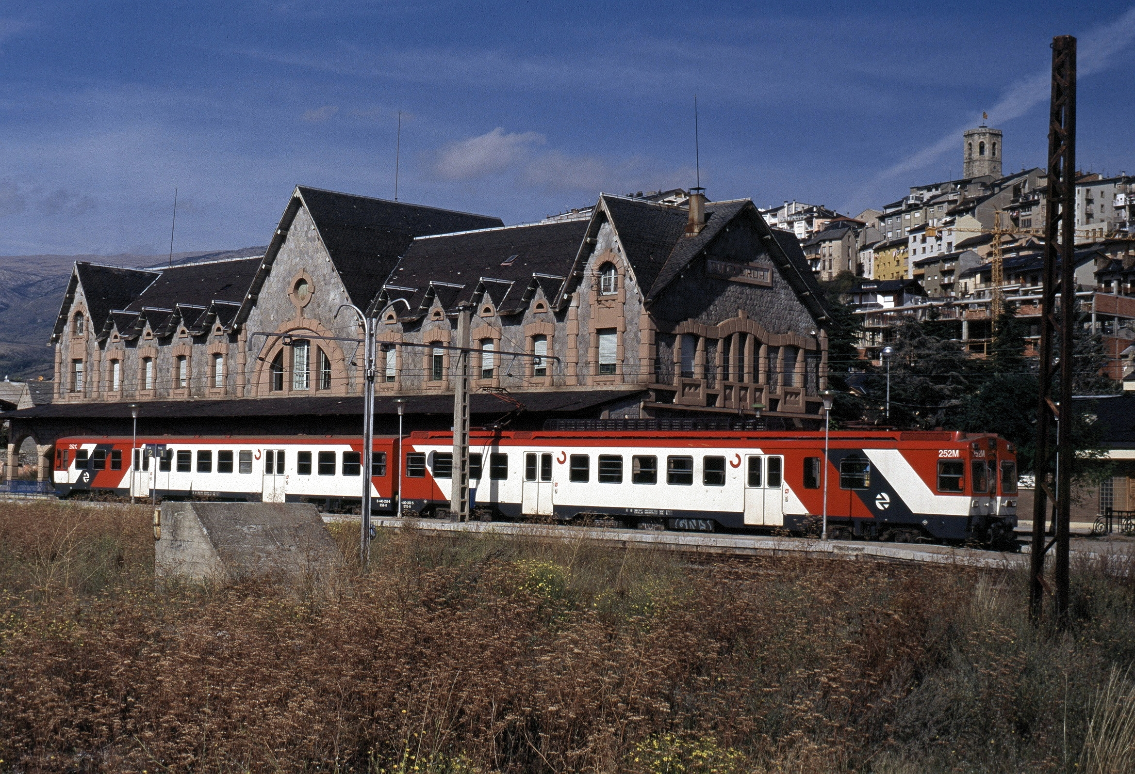 Una unidad 440 de Red Nacional de los Ferrocarriles Españoles en la Estación de Puigcerdá.